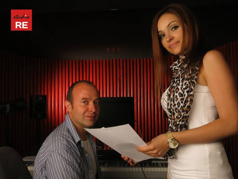 записи на първата авторска песен на Милена Коста